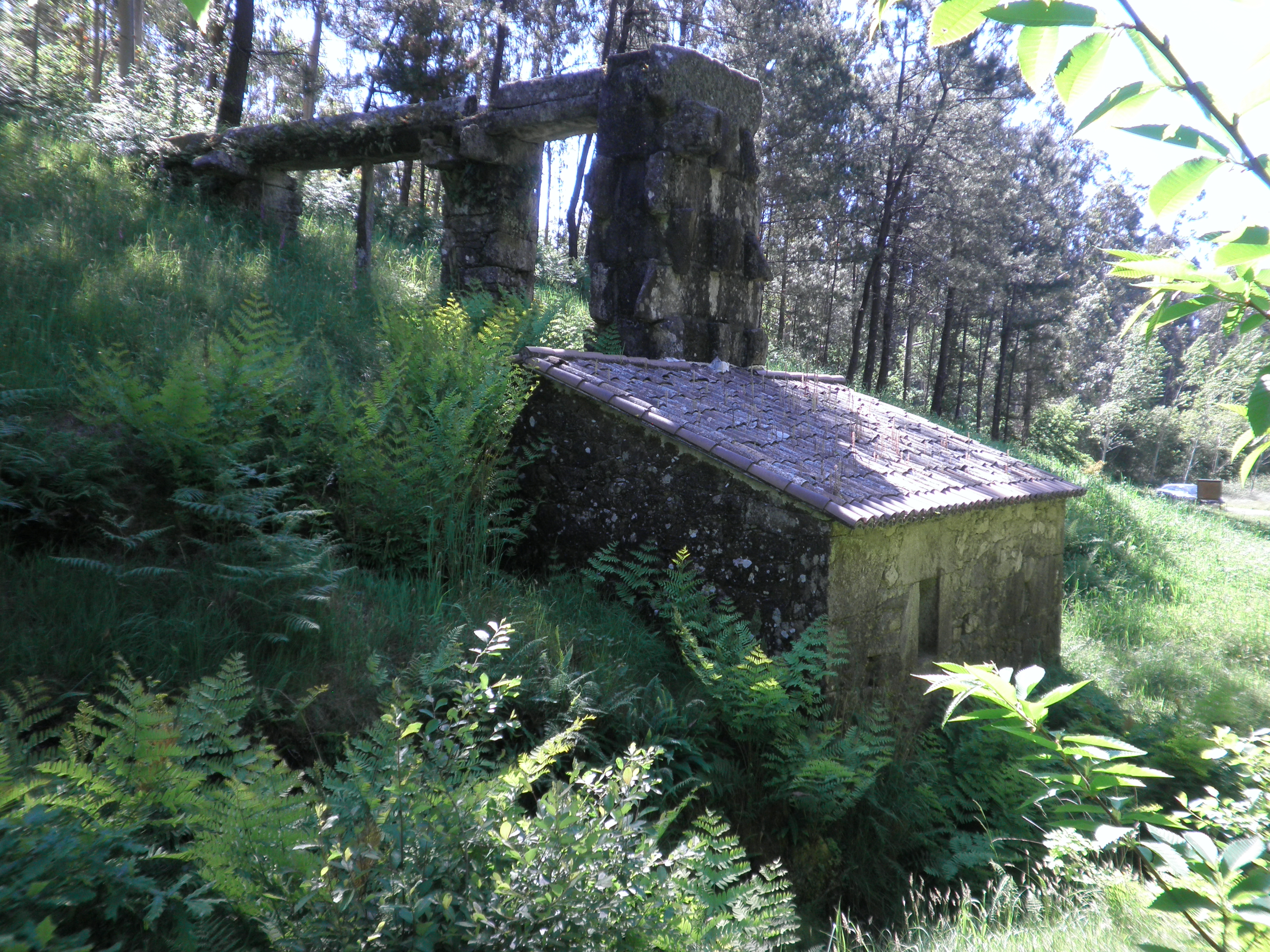 Muiño da Devesa